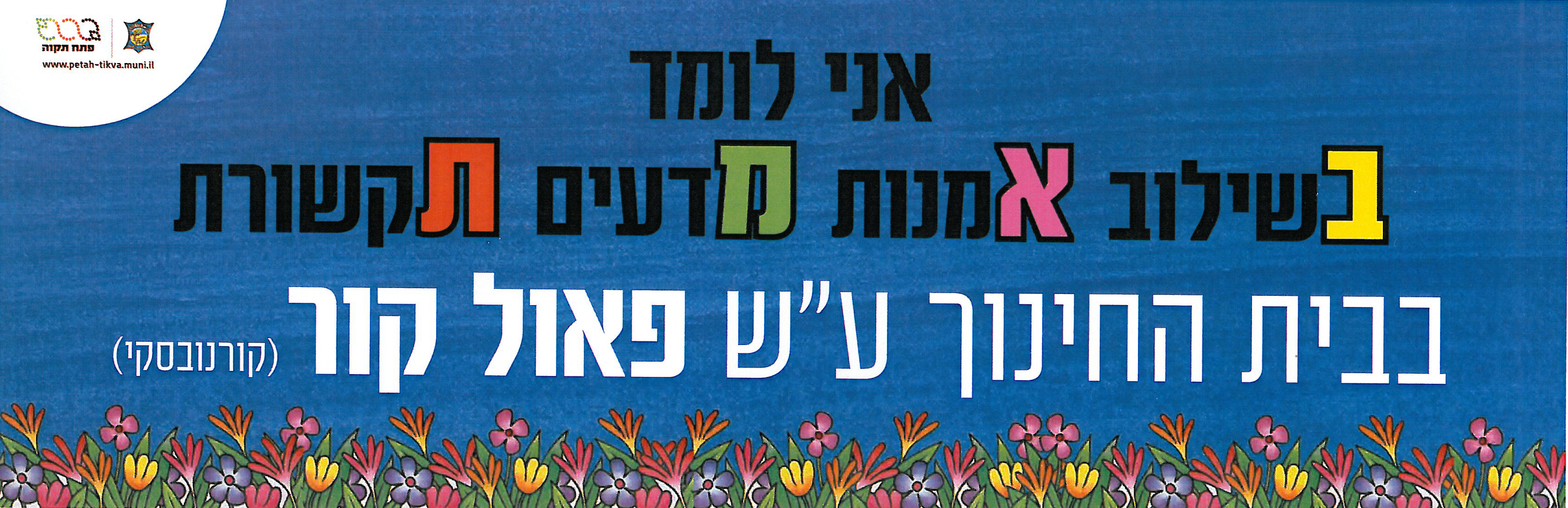 בית ספר ע"ש פאול קור בשכונת אם המושבות בפתח-תקווה